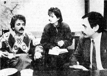 Stanisław Huskowski (z lewej), Anna Żychlińska i Krzysztof Turkowski